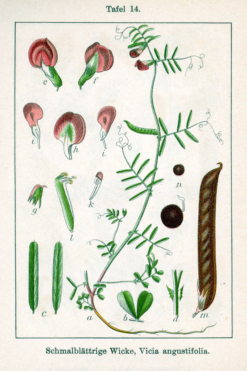 Vicia sativa subsp. nigra (L.) Ehrh., syn. Vicia angustifolia L., pro parte FloraWeb.de: Gewöhnliche Schmalblättrige Wicke, Vicia angustifolia subsp. angustifolia L., syn. Vicia sativa var. nigra L., Vicia sativa subsp. nigra (L.) Ehrh. Original Description Schmalbrättige Wicke, Vicia angustifolia